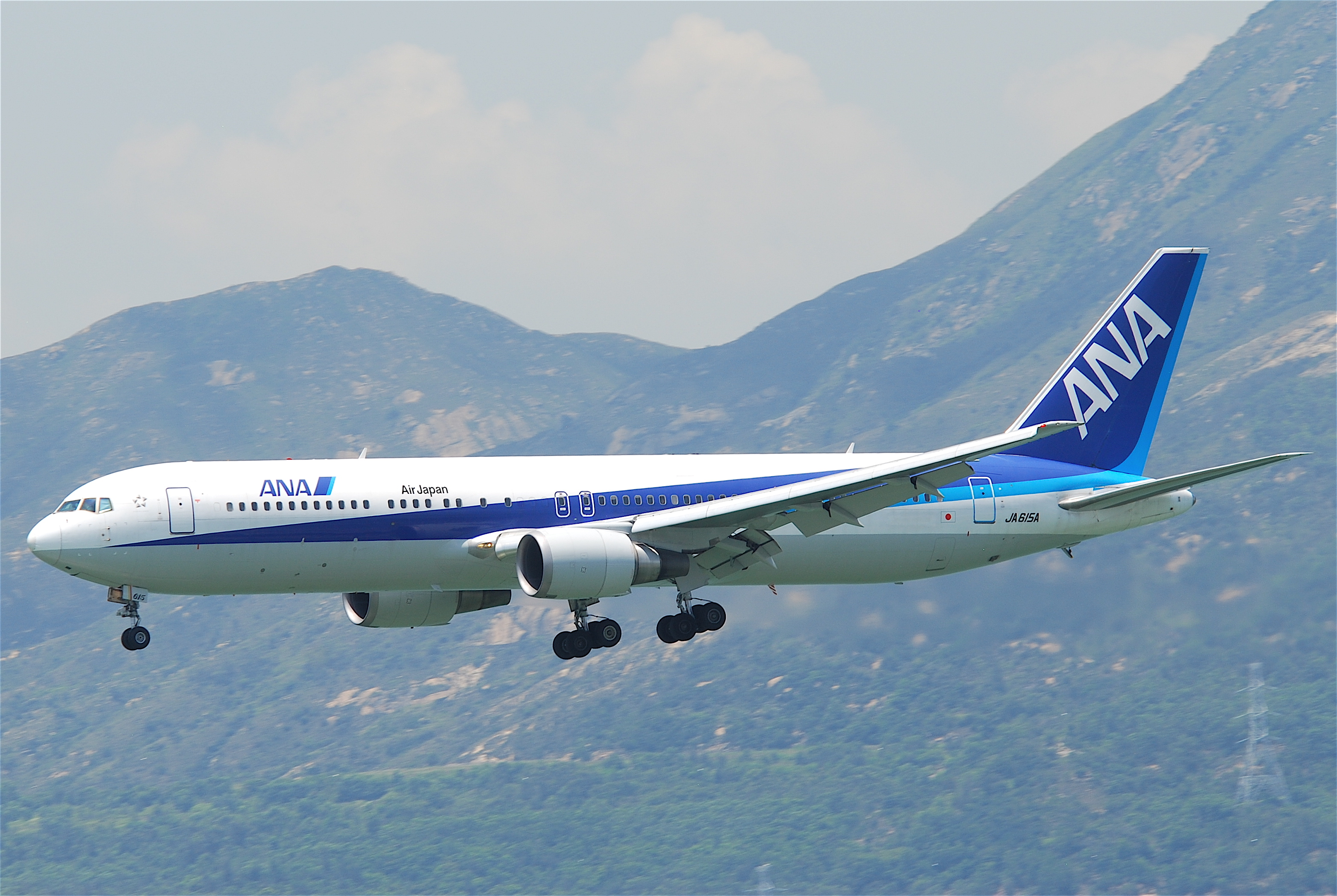 ANA Boeing 767-300ER; JA615A@HKG;04.08.2011/615mo